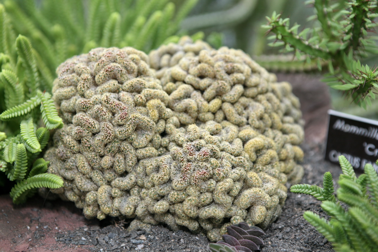 Mammillaria elongata, form 'Cristata'